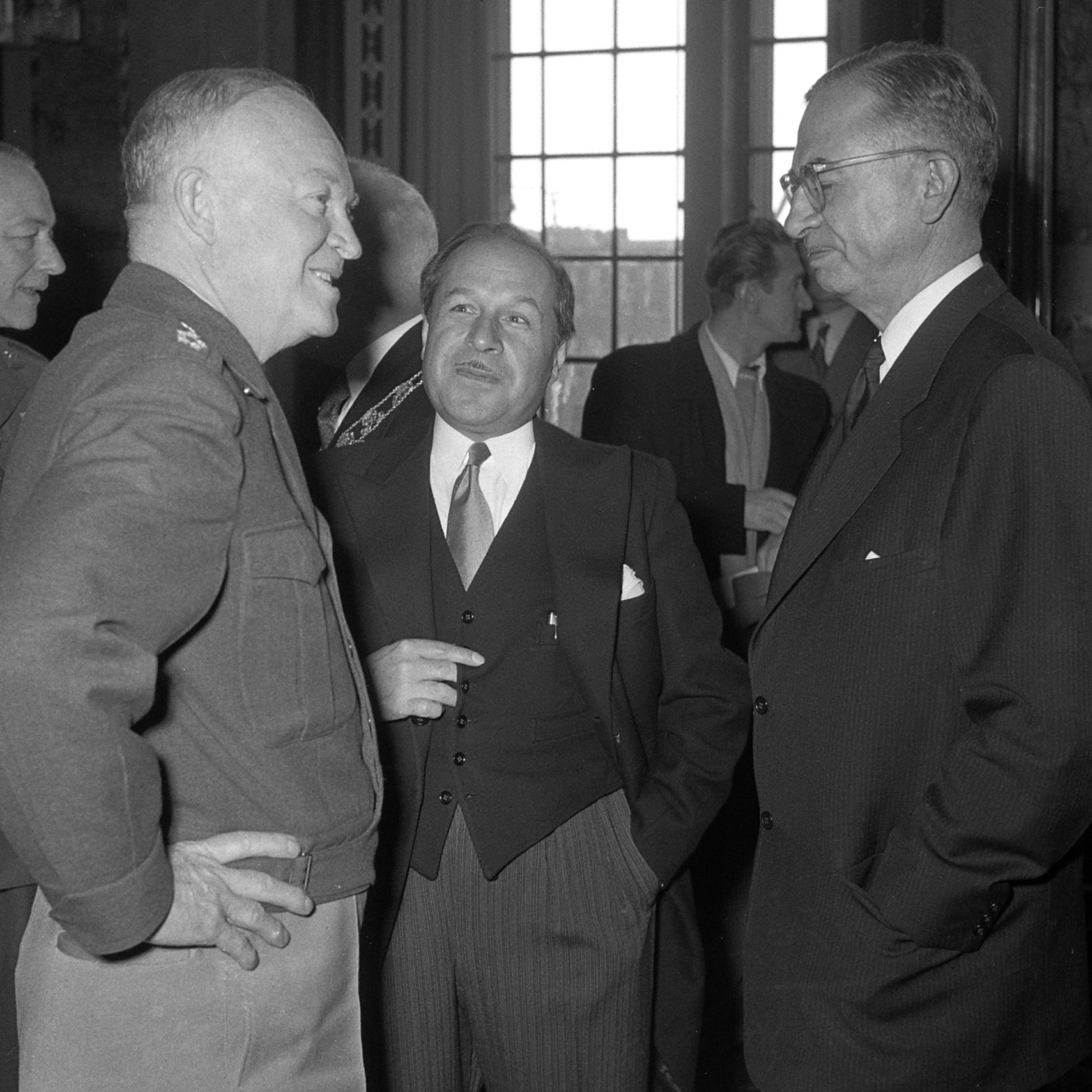 Eisenhower arriveert te Rotterdam om het commando over Canadese troepen die met het troepentransportschip Fairsea in Europa zijn aangekomen, over te nemen. Receptie op het stadhuis. In het midden de Canadese ambassadeur Pierre Dupuy. Rechts de Canadese minister van Defensie, Brooke Claxton 21 november 1951